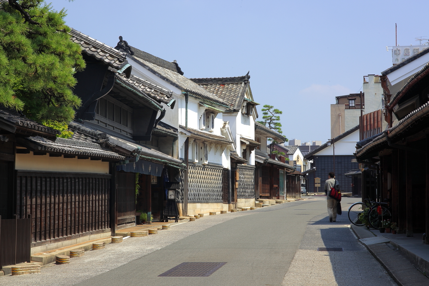 有松の歴史的町並み（名古屋市緑区、2013年）